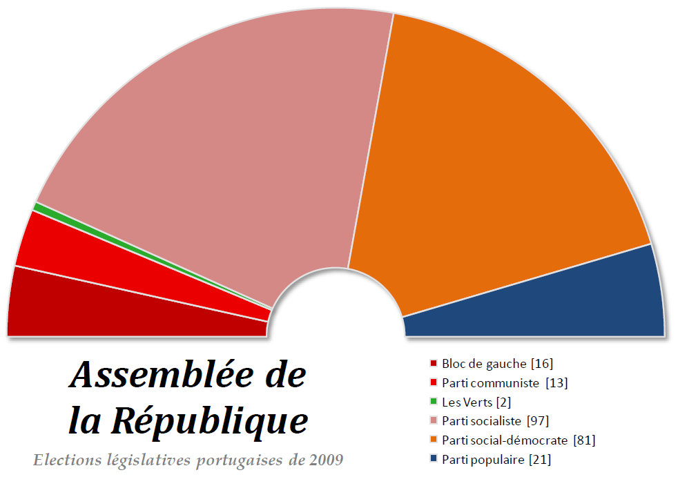 Composition politique de l'Assemblée de la République du Portugal après les élections législatives de 2009.